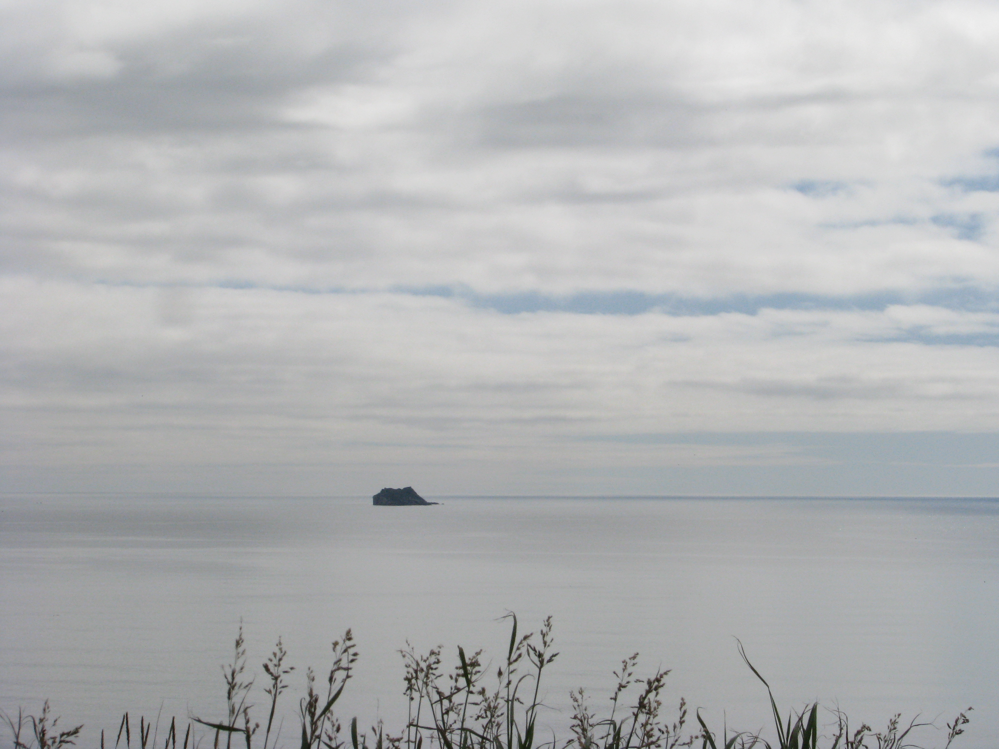 Остров Арий Камень, Алеутский район. Вид с о. Беринга. This image is related to the protected area of Russia number 4110008